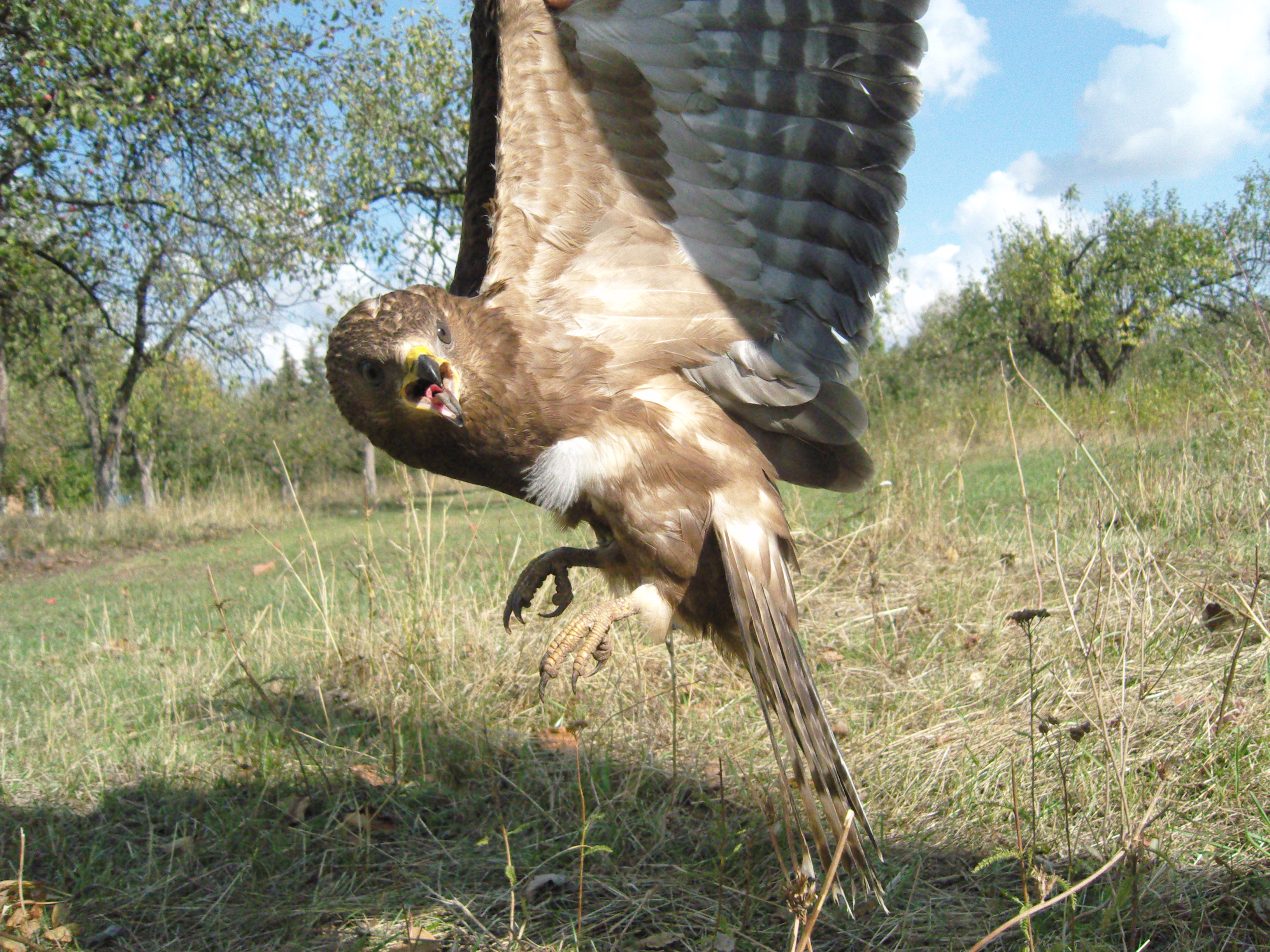 Лес на Ворскле.